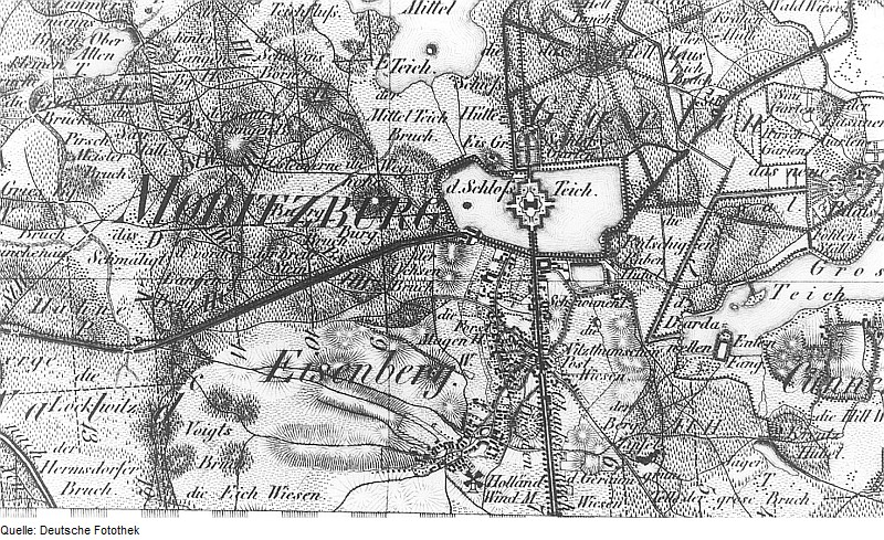 Original image description from the Deutsche Fotothek Moritzburg. Ausschnitt aus: Oberreit, Sect. Großenhain, 1841/43